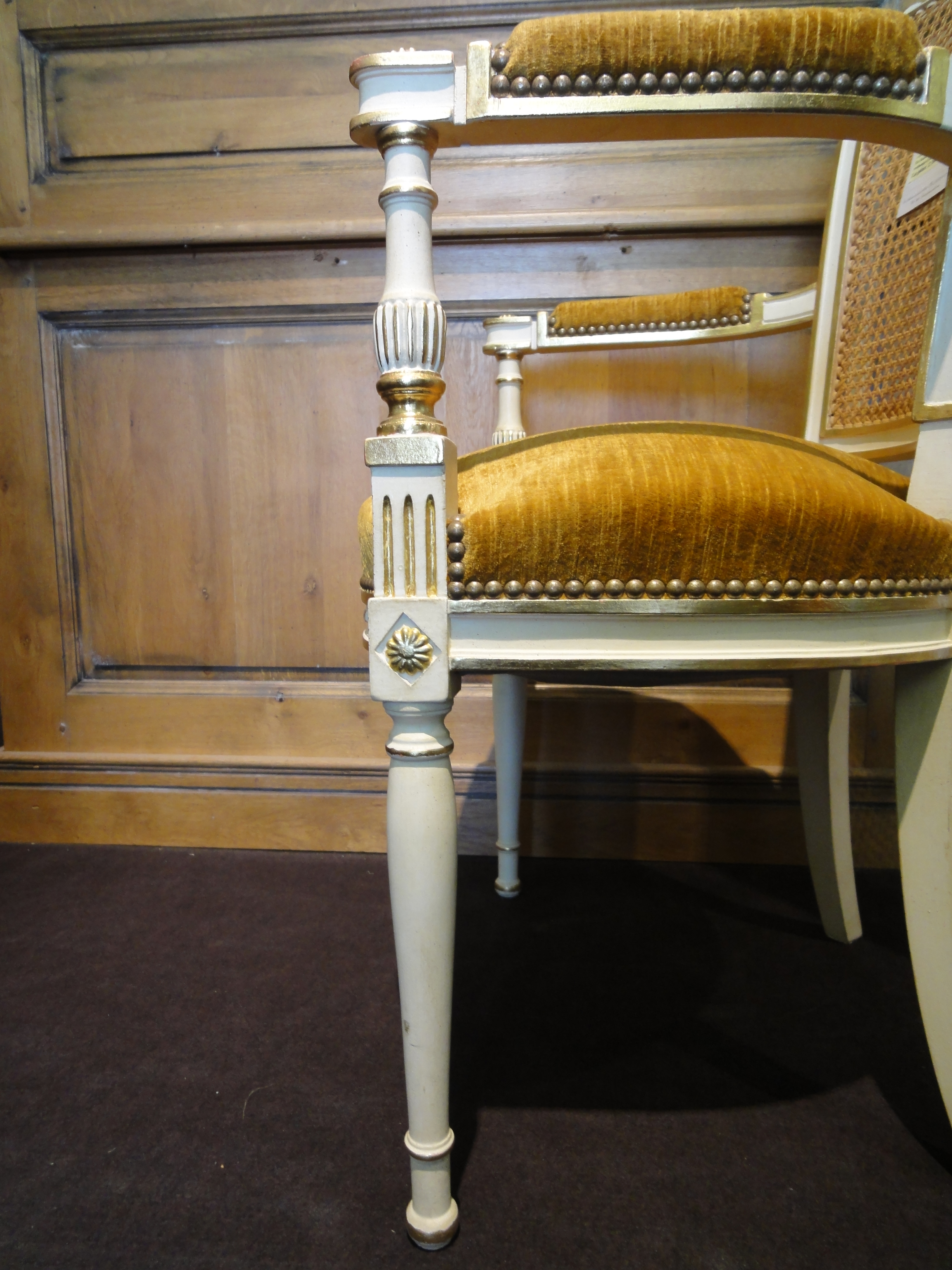 Style Directoire, réalisé par les Ateliers Allot Frères.